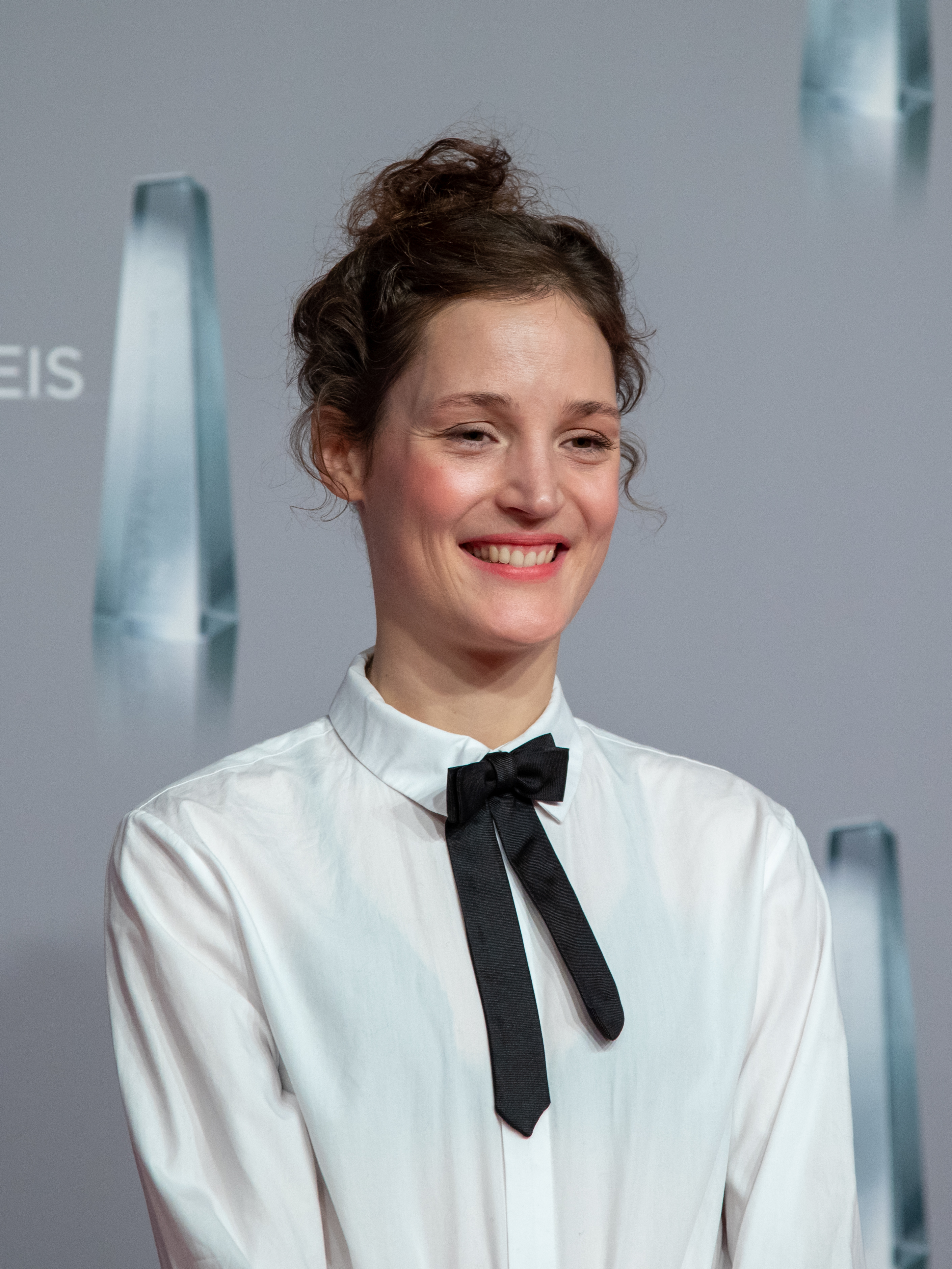 Vicky Krieps beim Deutschen Fernsehpreis 2019 in der Düsseldorfer Rheinterrasse